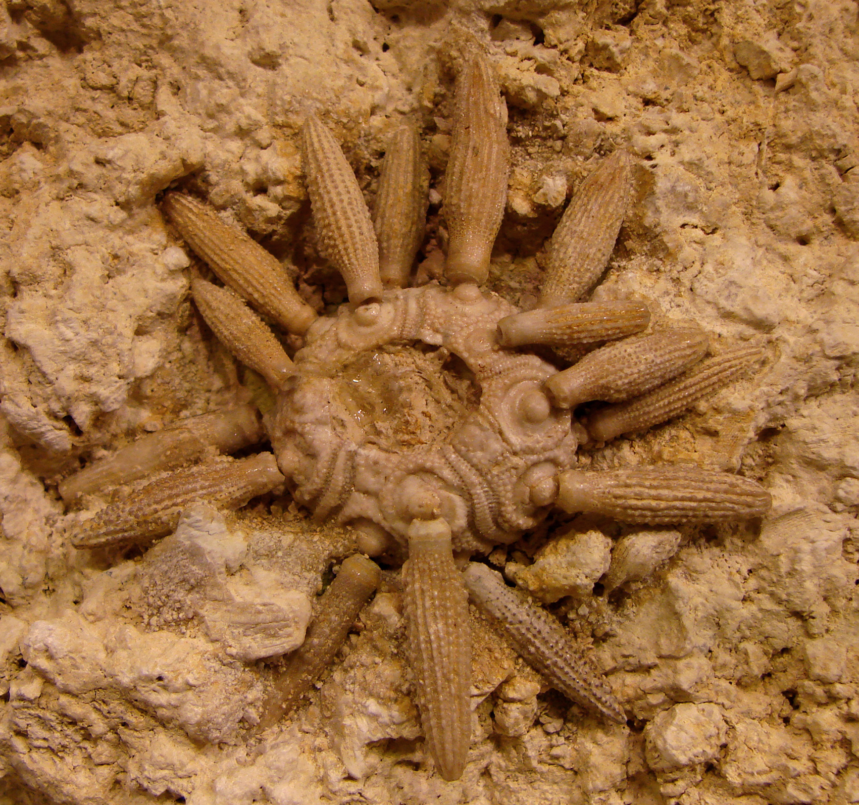 Balanocidaris marginata, Kimméridgien. Provenance: La Rochelle.